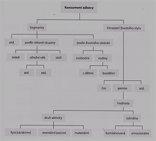 Příklad jednoduchého stromu významnosti s několika základními volbami v několika větvích